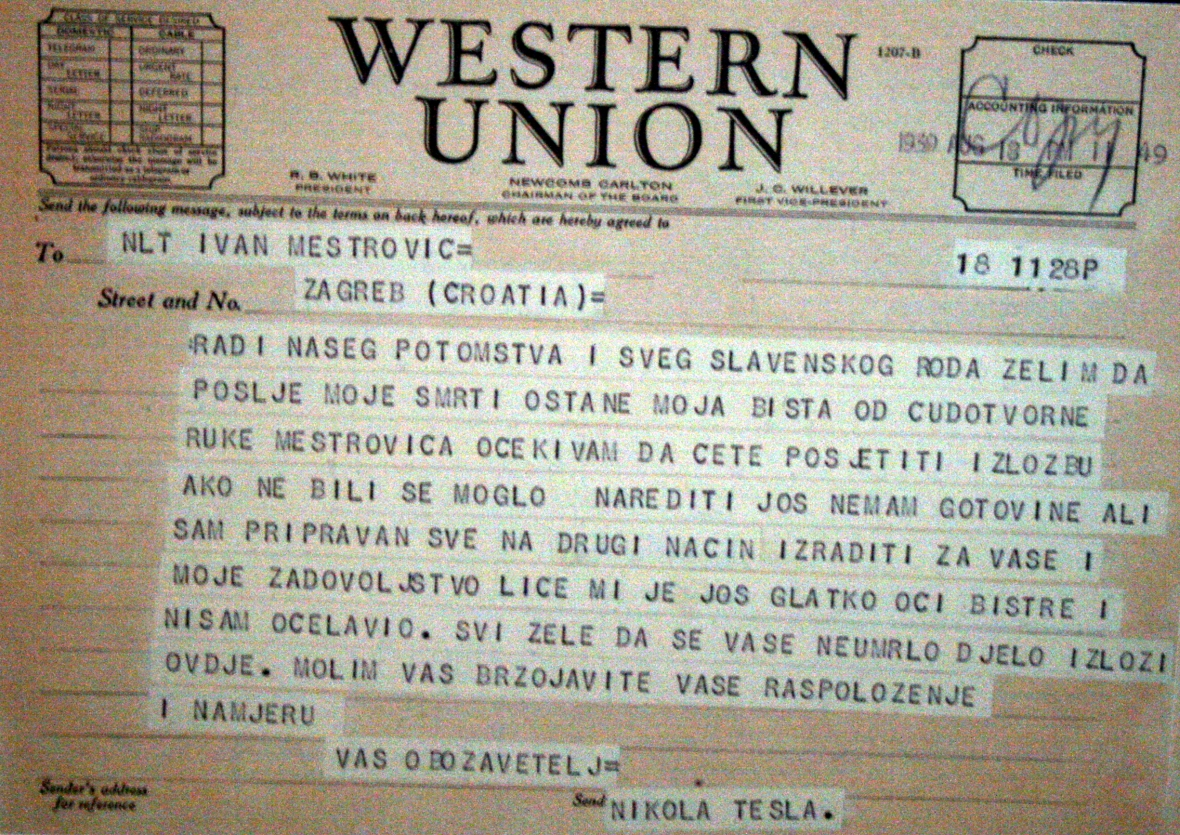 brzojav Nikole Tesle Ivanu Meštroviću